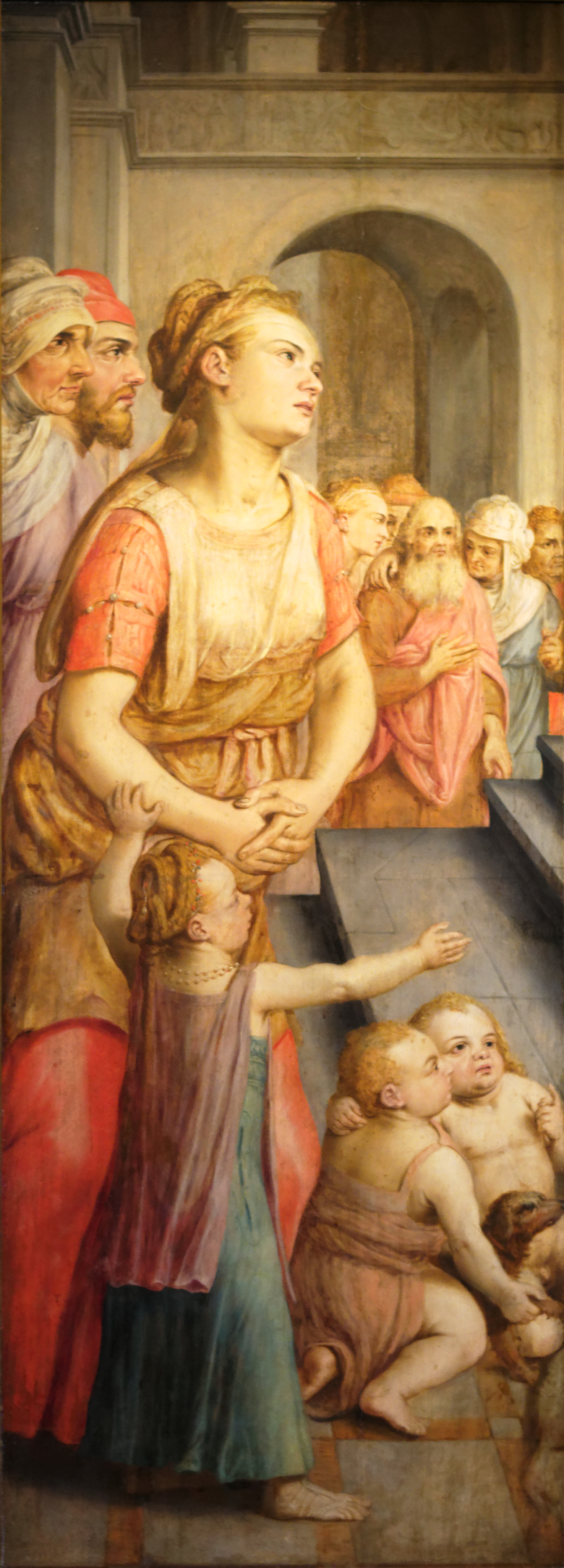 Présentation au Temple Anthonie Van Blockland (Montfoort 1532 - Utrecht 1583). Huile sur toile biface (La rencontre de la Vierge et de Sainte Elisabeth au verso). Don Galichon 1894. Exposé au Musée des Ursulines de Mâcon. Inv 358